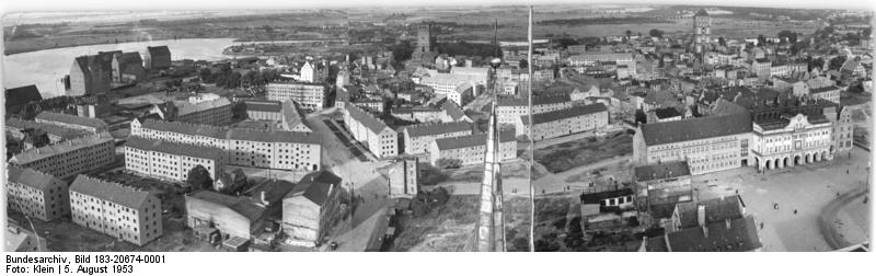 Rostock, Altstadt, Rathaus Zentralbild Klein 5.8.1953 Rostock UBz: Blick von Turm der Marienkirche in östlicher Richtung. Umfangreiche Wohnbauten bestimmen das Bild dieses Teiles der Rostocker Altstadt. Rechts im Bild das Rostocker Rathaus. Es wurde durch einen Neubau erweitert.